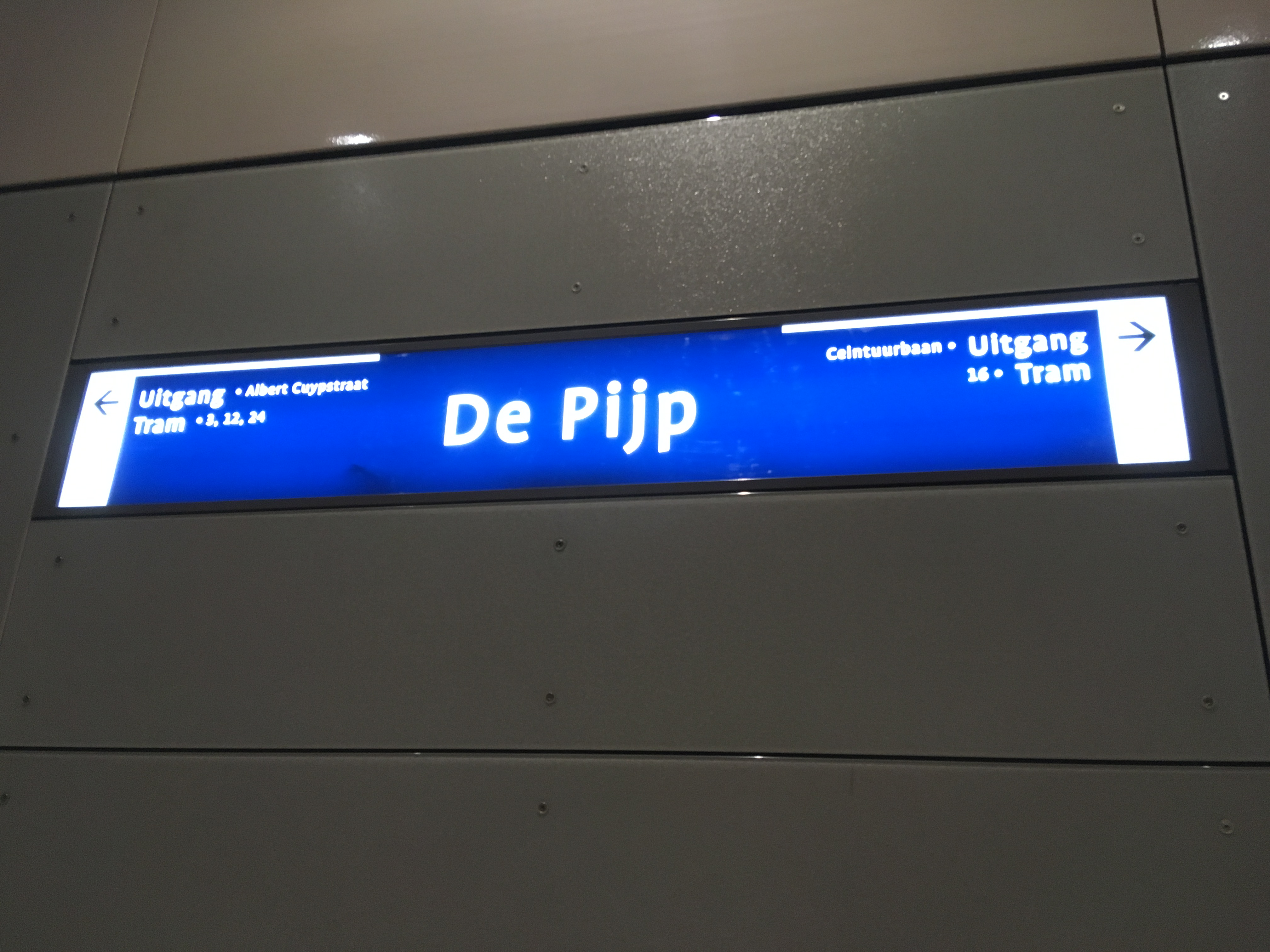 Stationsbord metrostation De Pijp, Noord-Zuidlijn